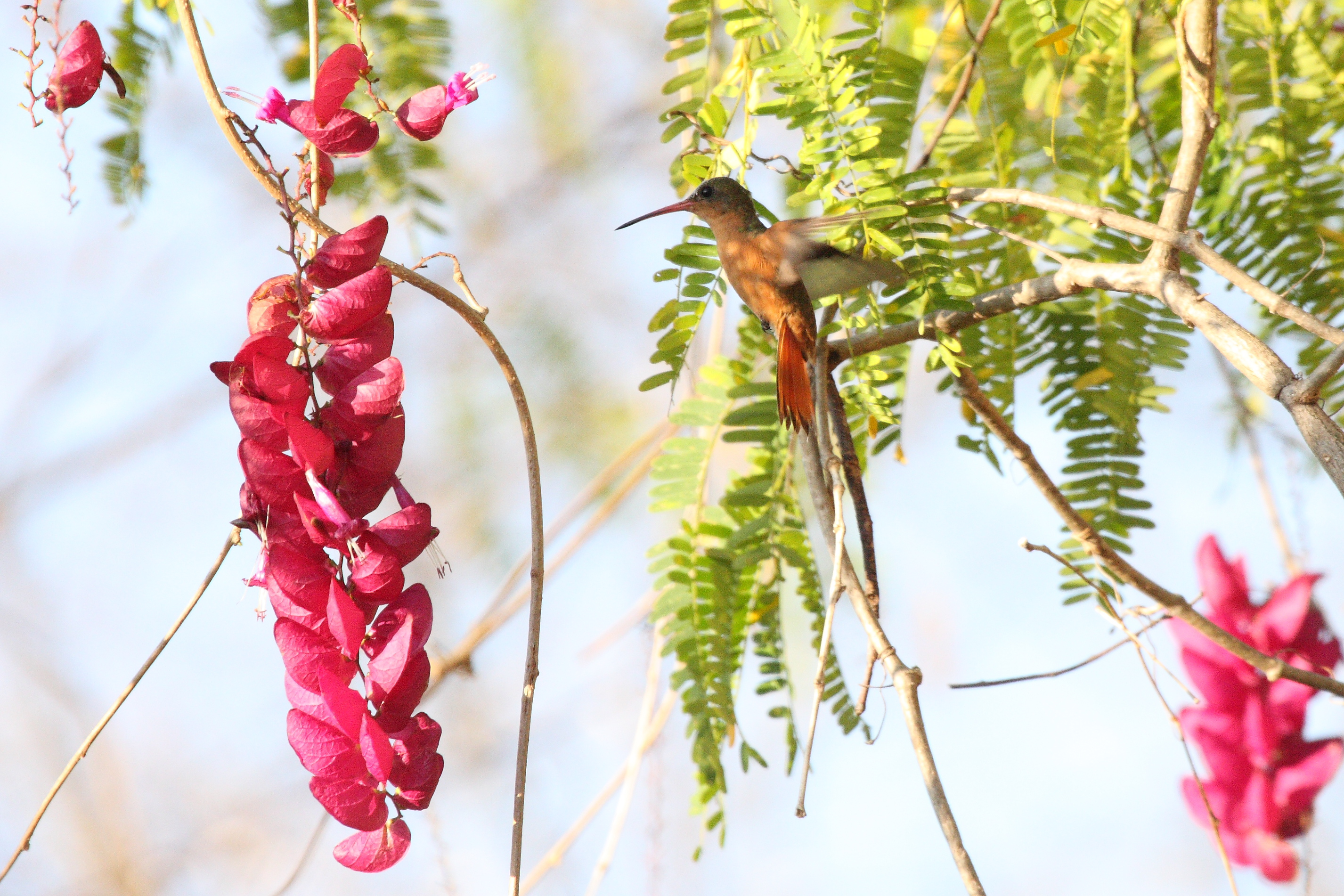 Cinnamon Hummingbird (Amazilia rutila)